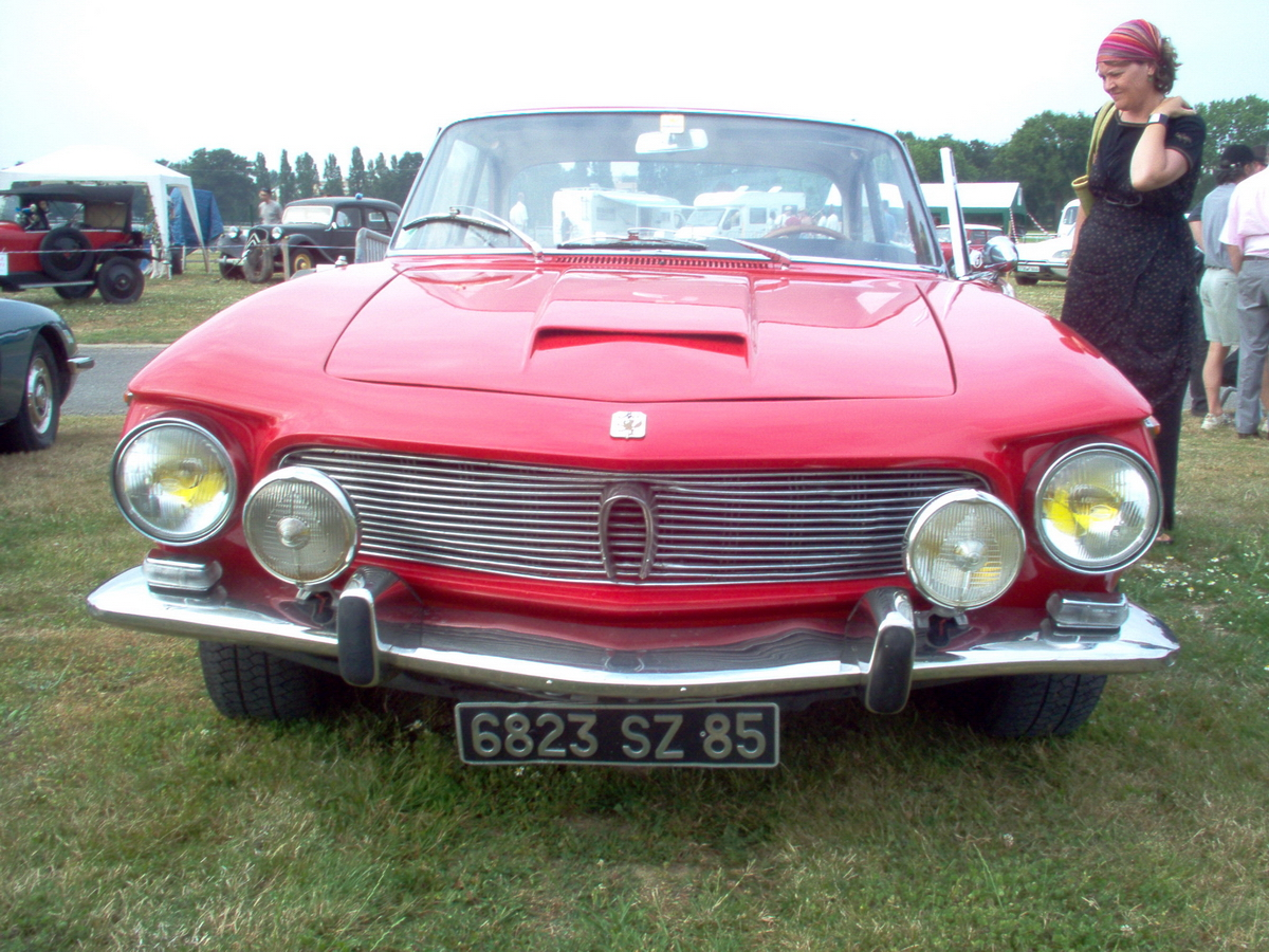 Iso Rivolta (1961)